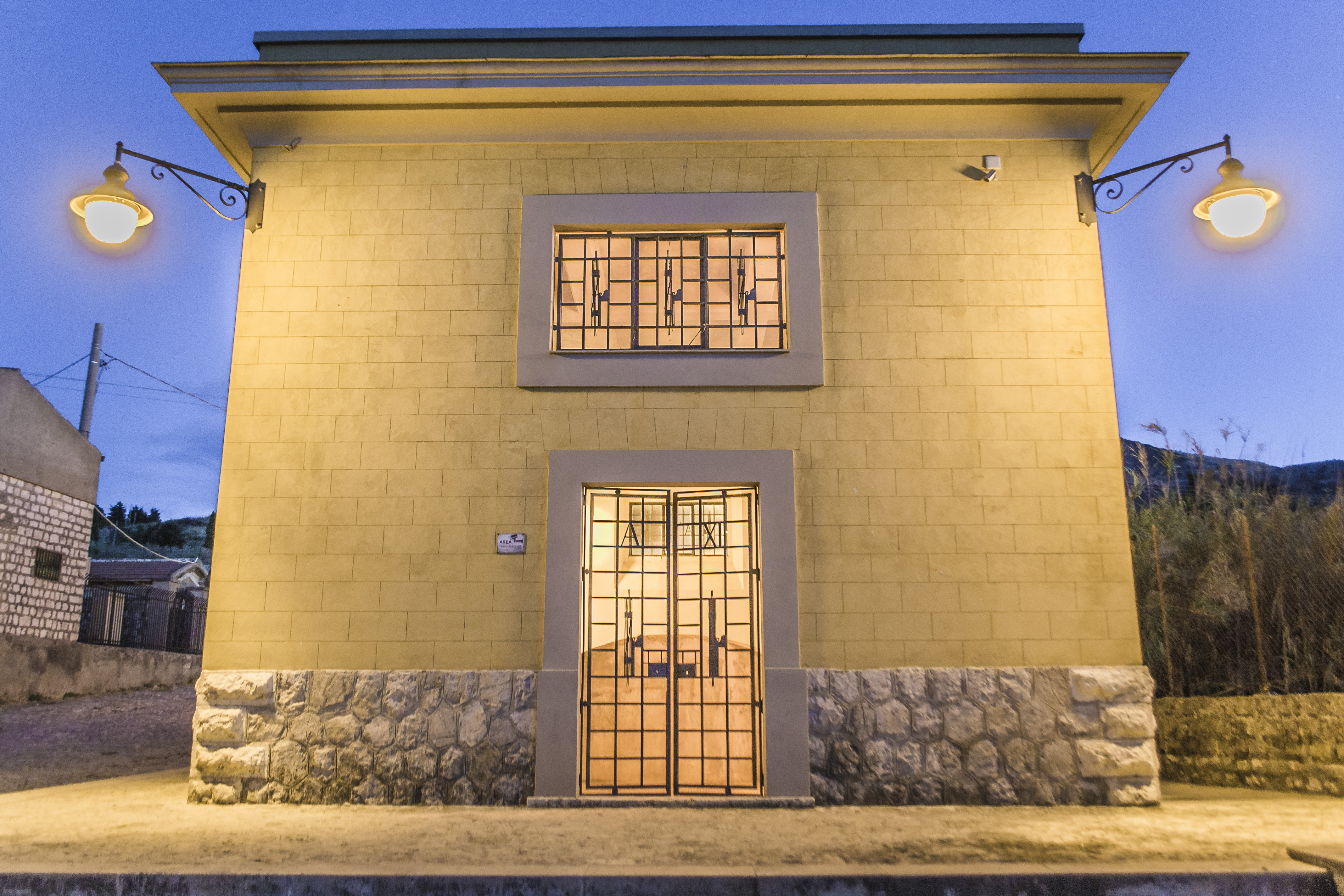 Lavatoio This is a photo of a monument which is part of cultural heritage of Italy.